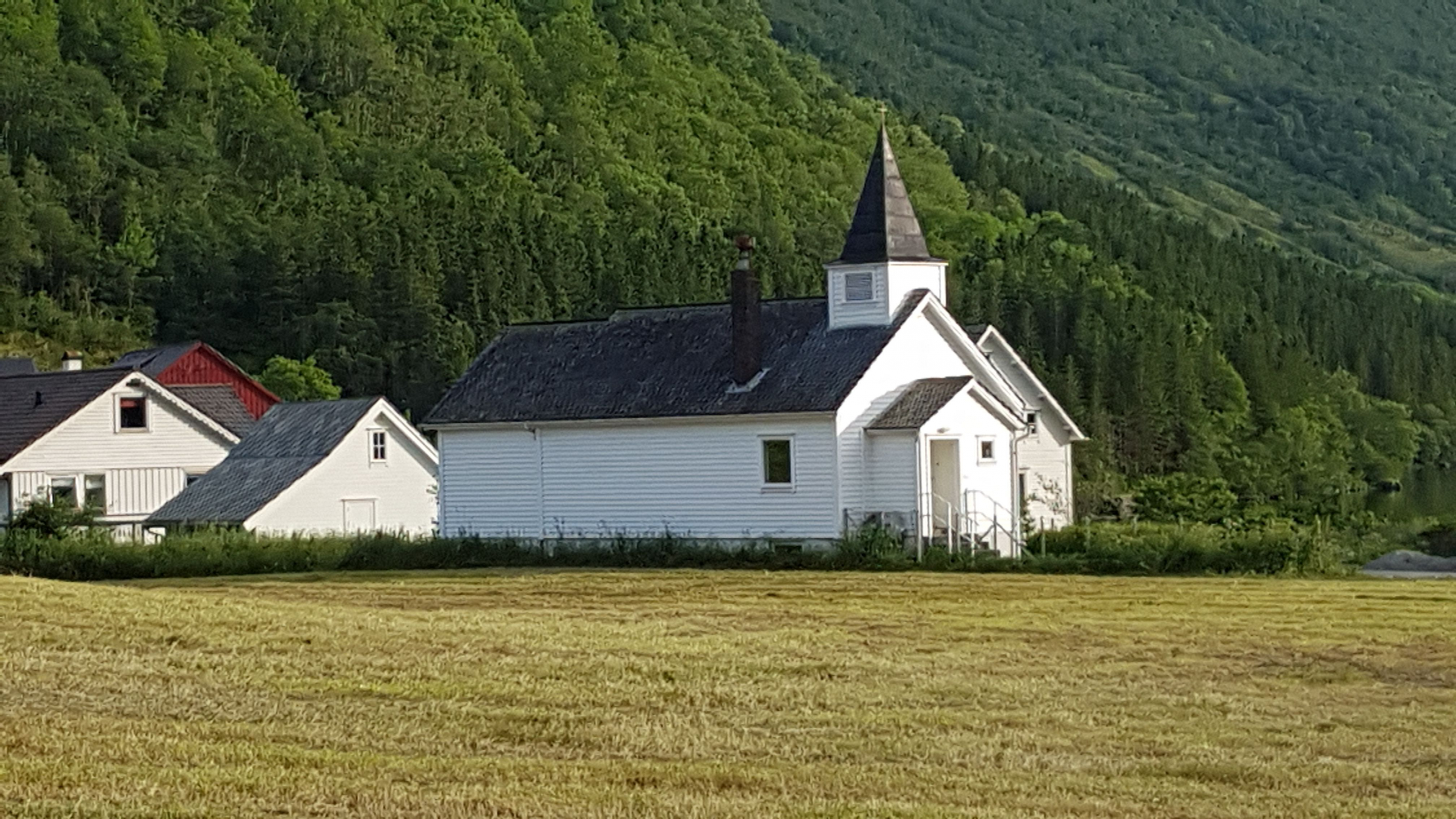 Frette bedehuskapell i Etne kommune. Foto: Roger Grimelid, fra Riksantikvarens Kulturminnesøk.